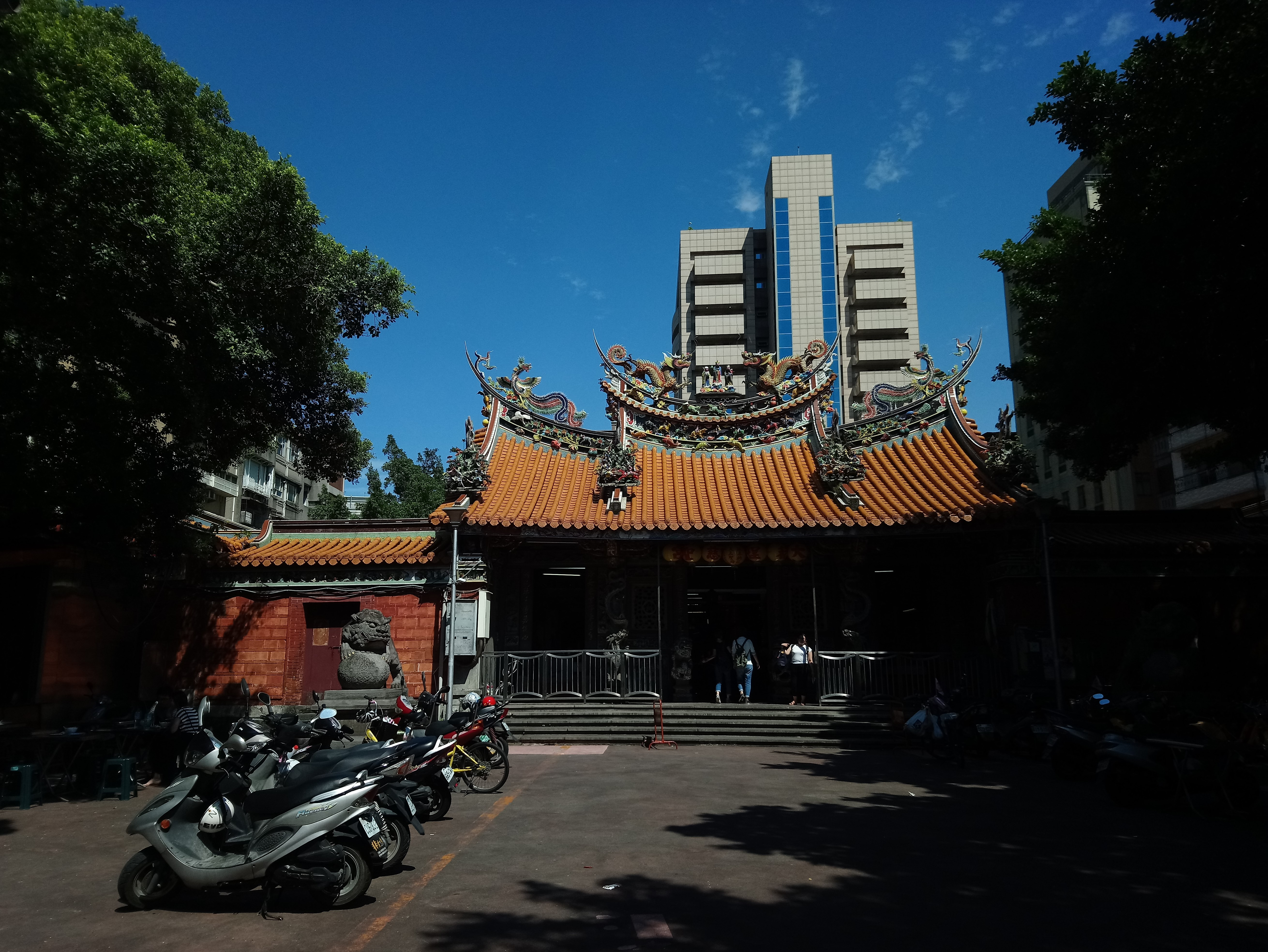 大稻埕慈聖宮,臺北市大同區延平次分區延平里